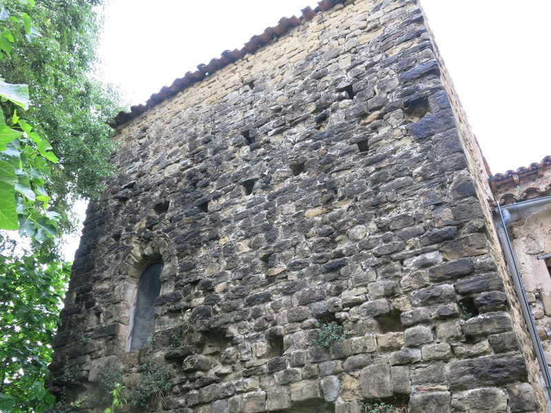 castell de Sales de Llierca a la Comarca de la Garrotxa - Catalunya